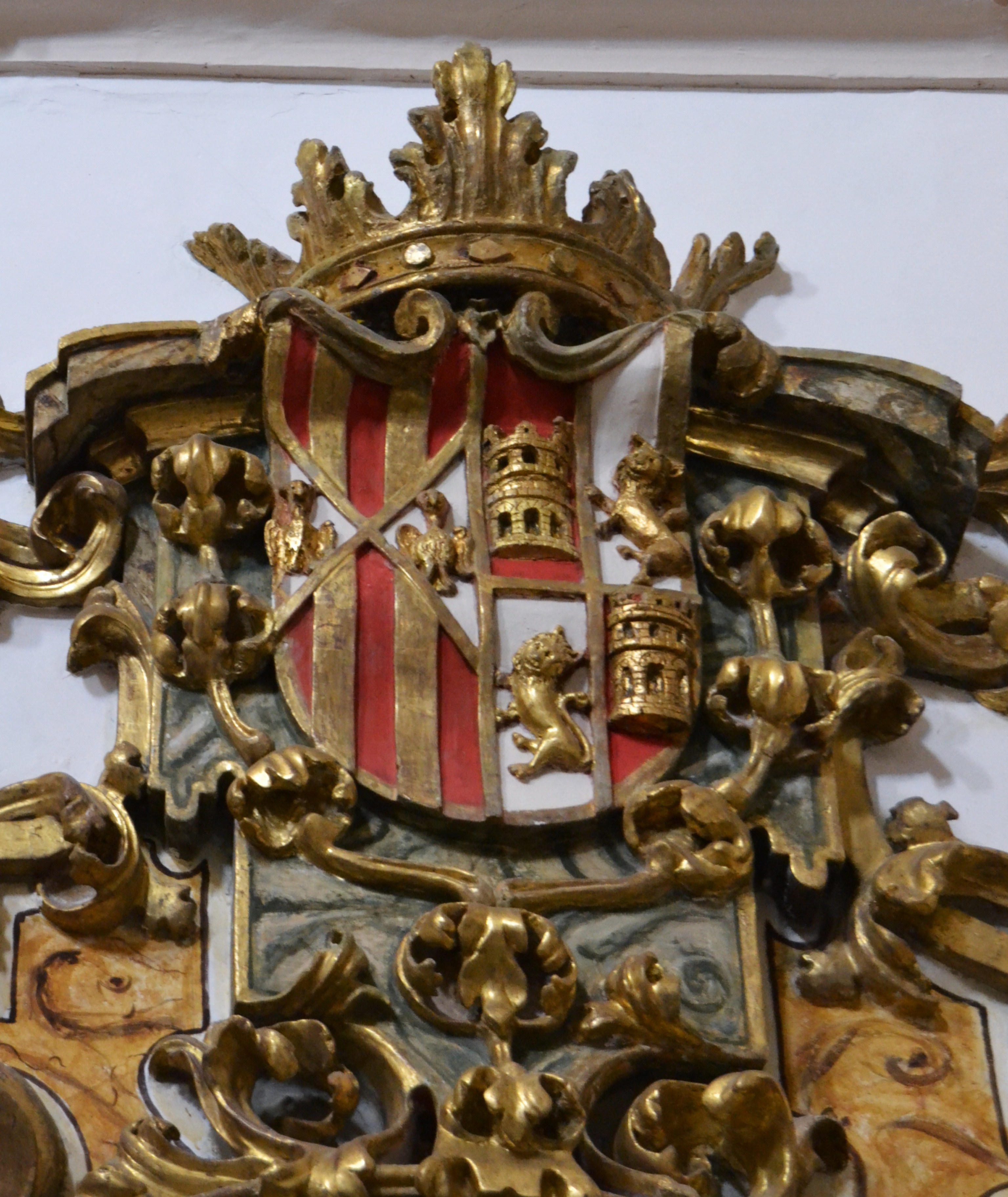 Escut de Maria de Castella, església del monestir de la Trinitat, València.